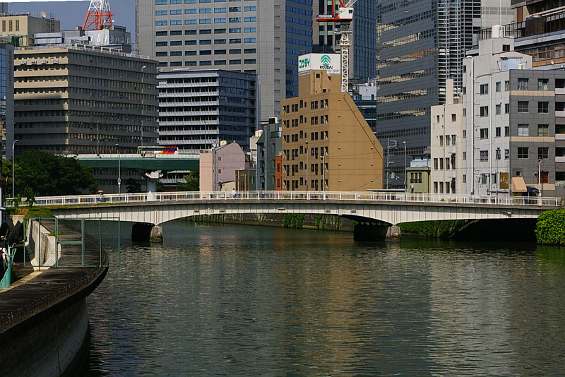 Tikuzen-Bashi (bridge), Osaka City, Japan.